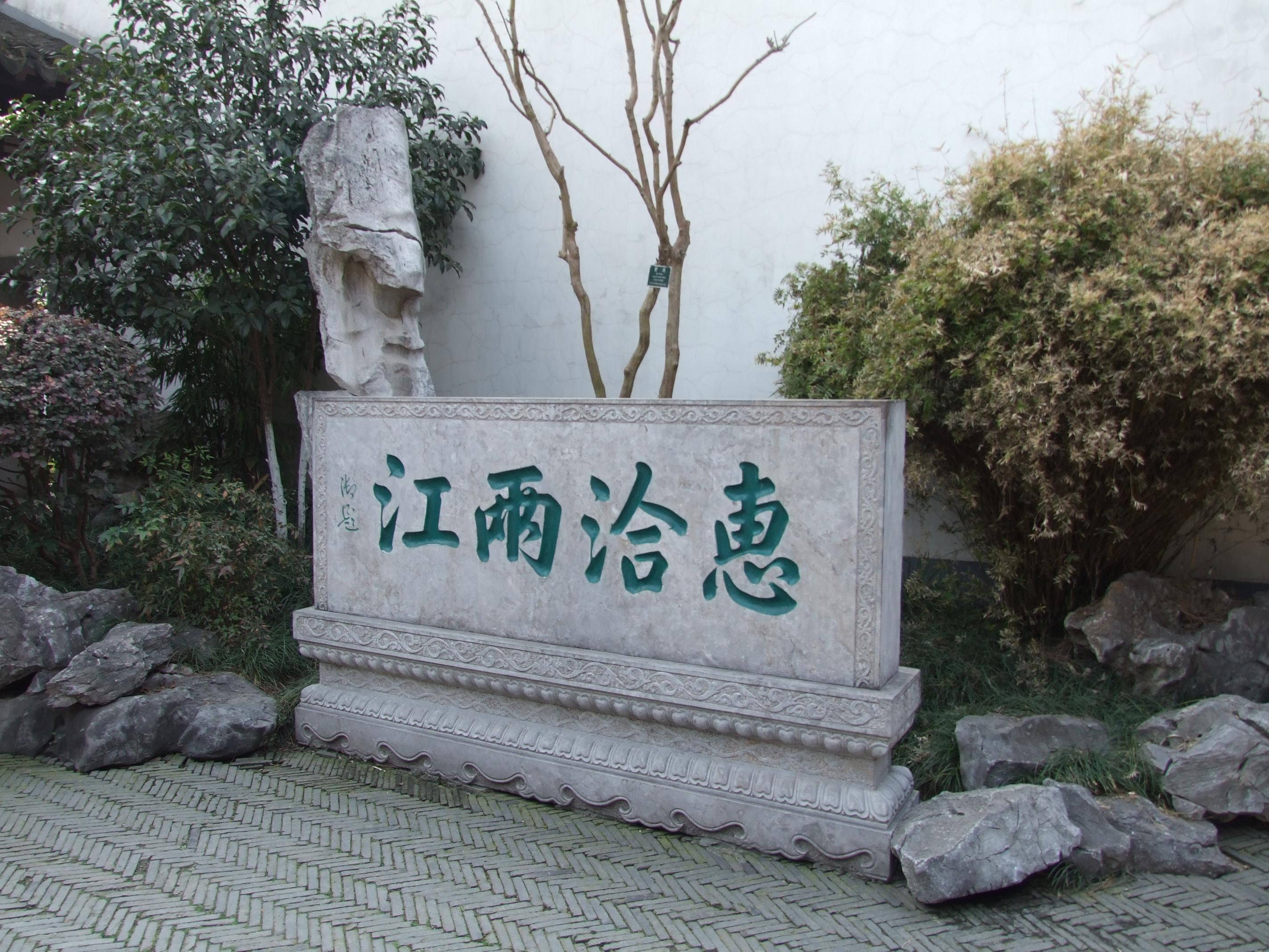 两江总督府